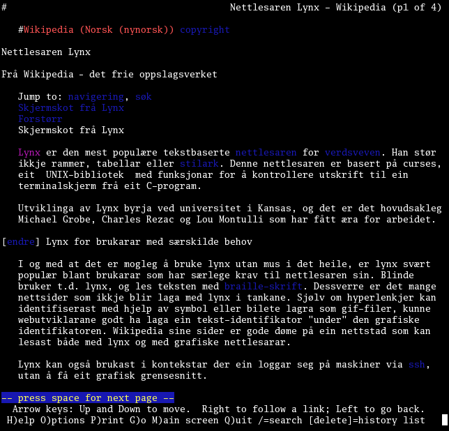 Skjermbilde av nettlesaren Lynx med artikkelen nettlesaren Lynx opna.